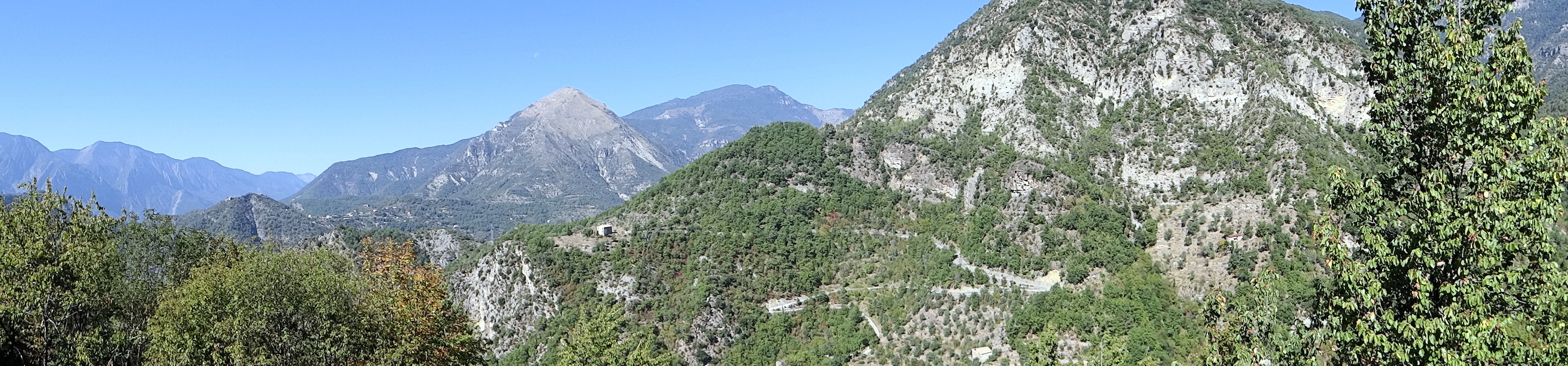 La Tour (Alpes-Maritimes) - Panorama vers l'ouest, la vallée de la Tinée et Tournefort